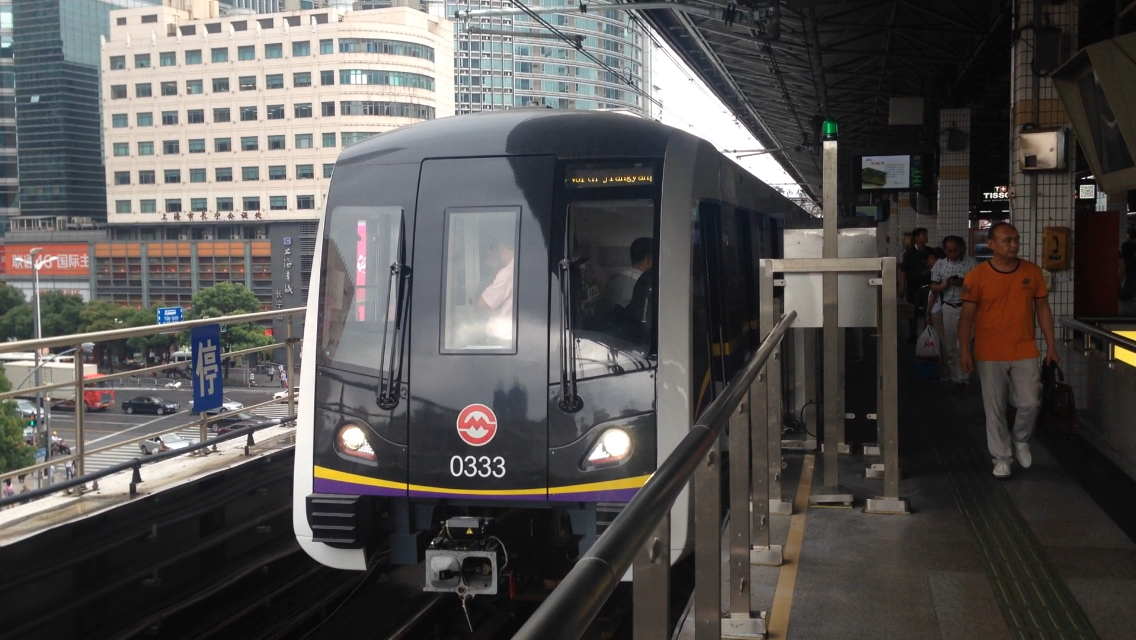 中文（中国大陆）: 3号线北车阿尔斯通列车在中山公园